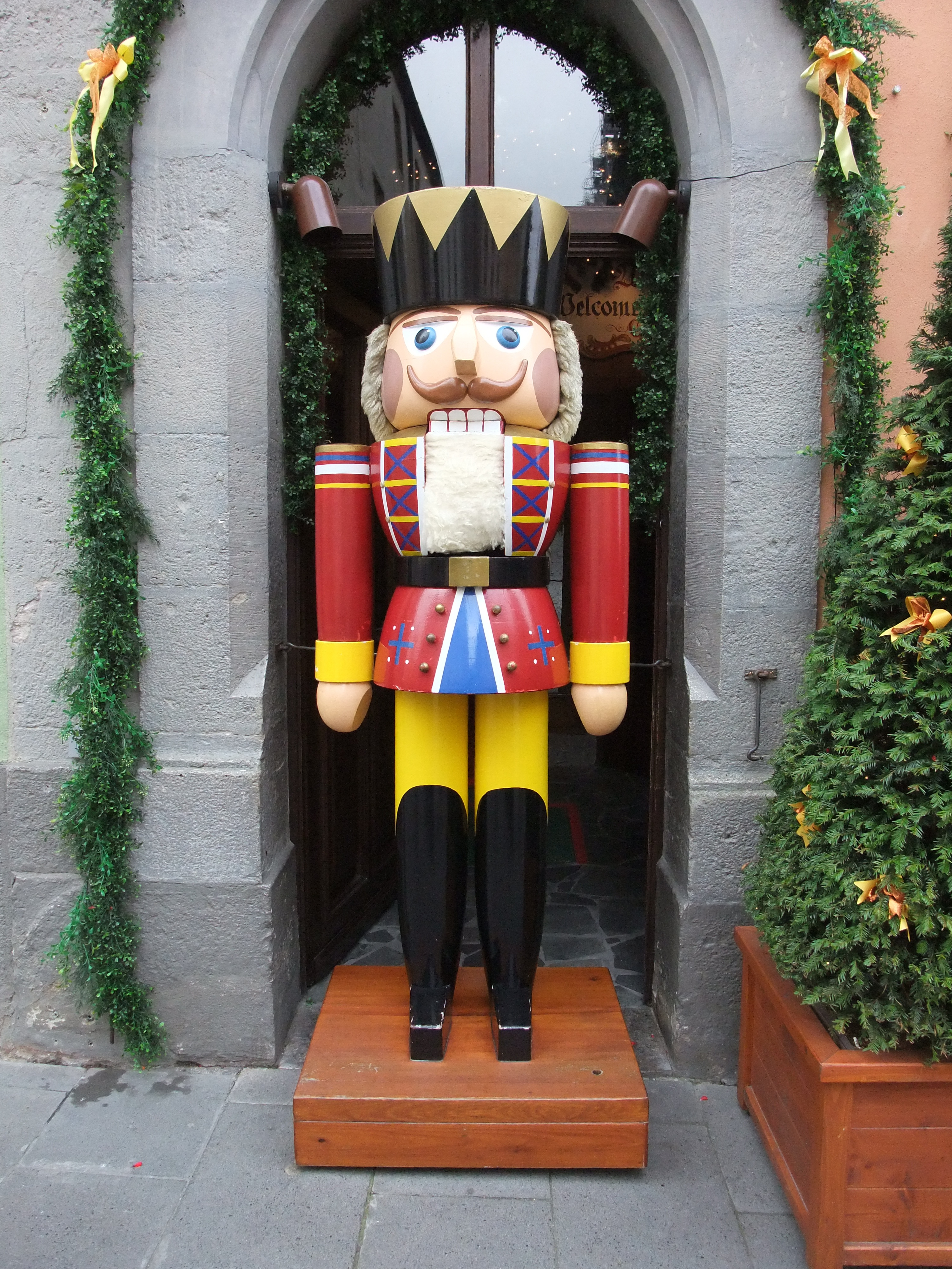 Ein lebensgroßer Nussknacker vor dem Weihnachtsmuseum in Rothenburg